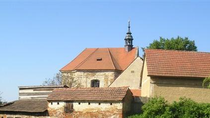 Kaple v Hodyni (Kožlany)